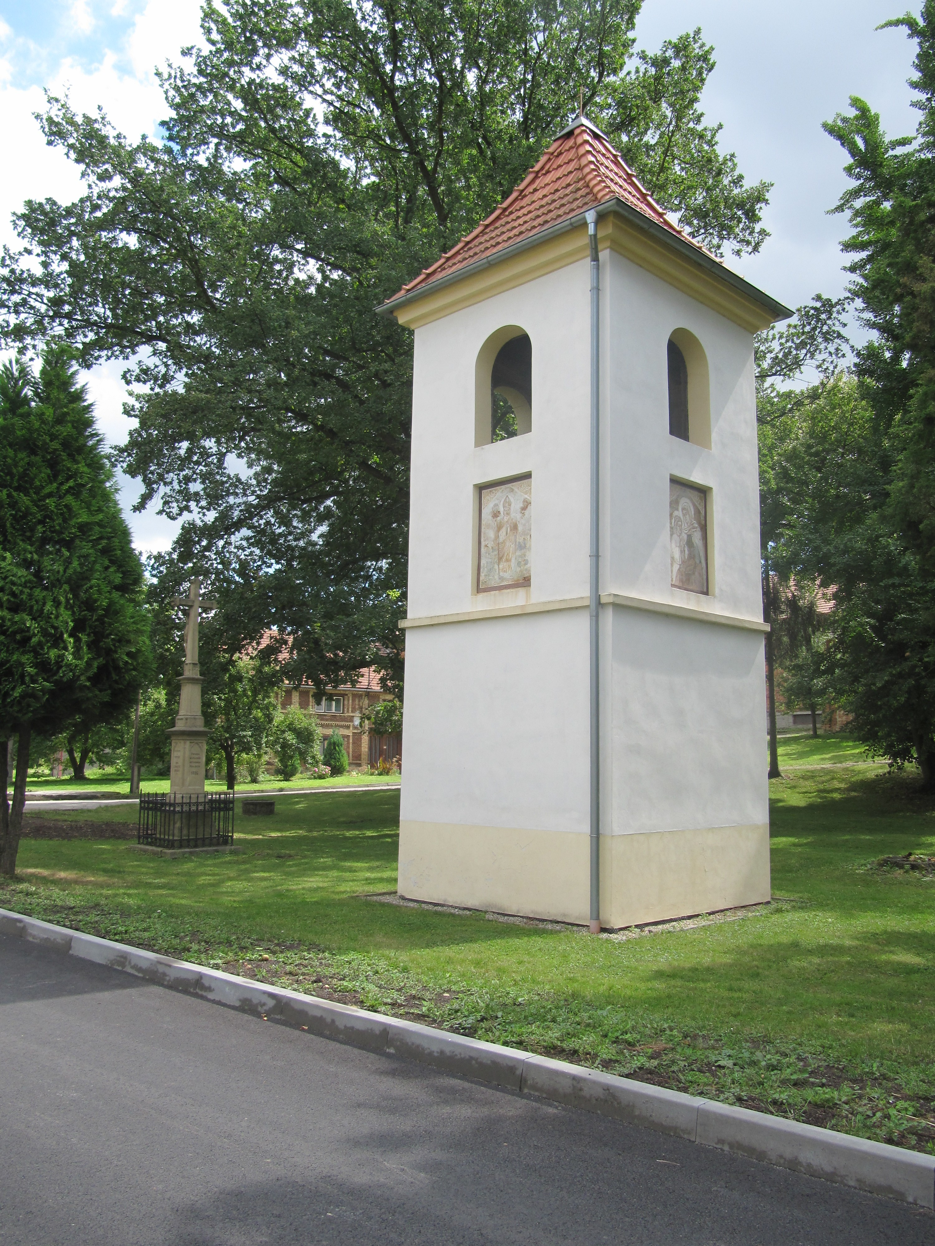 Obědkovice, okres Prostějov, Česká republika.